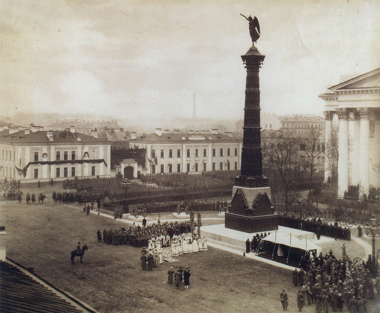 Открытие Колонны Славы в Петербурге 1886